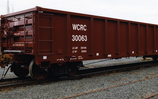 Gondola